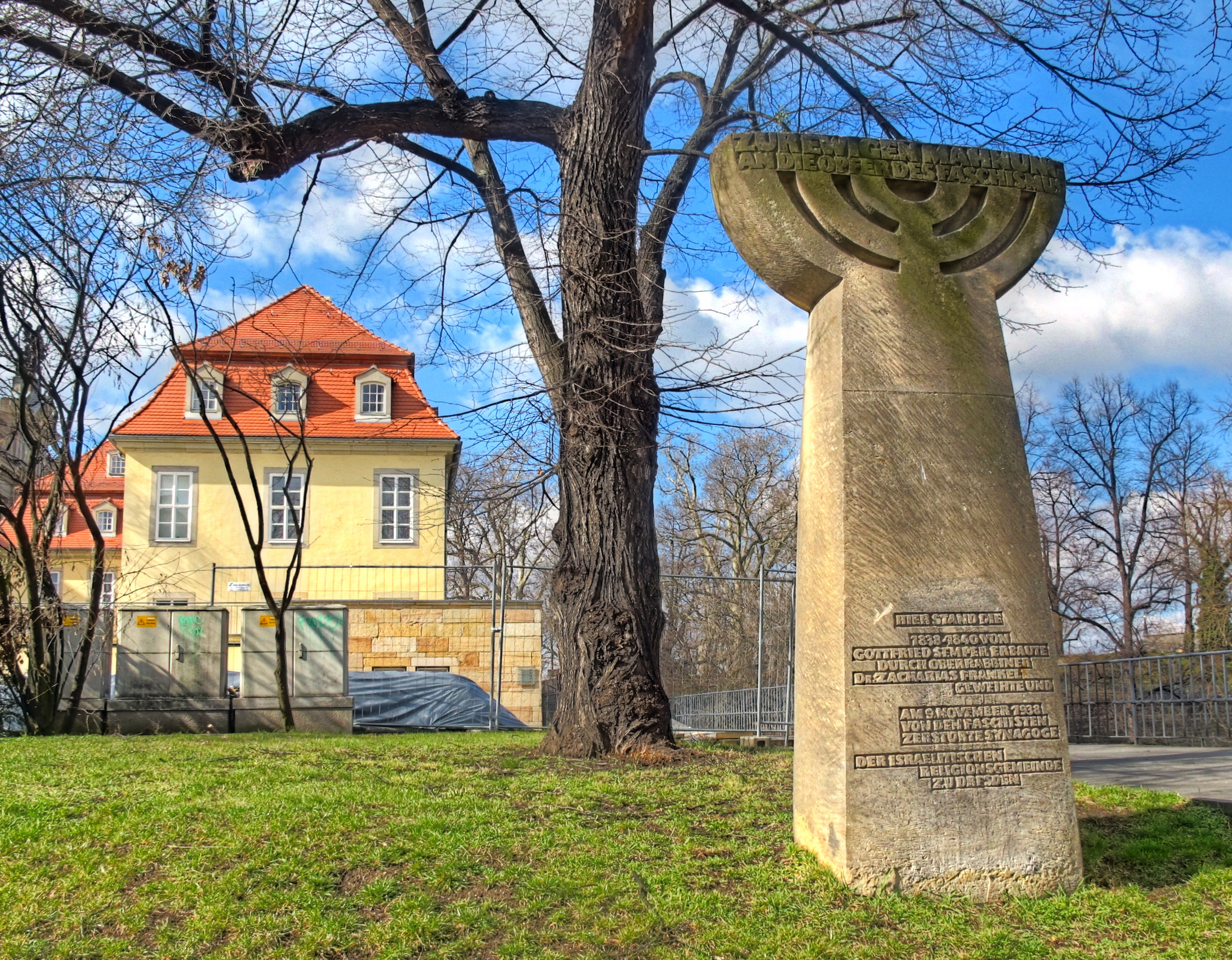 Deutschland, Sachsen, Dresden, Gedenkstein an die Zerstörung der alten, von Gottfried Semper errichteten Synagoge, im Jahre 1938; von Friedemann Döhner 1975 gestaltet